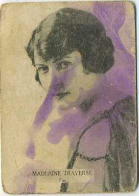 Madlaine Traverse